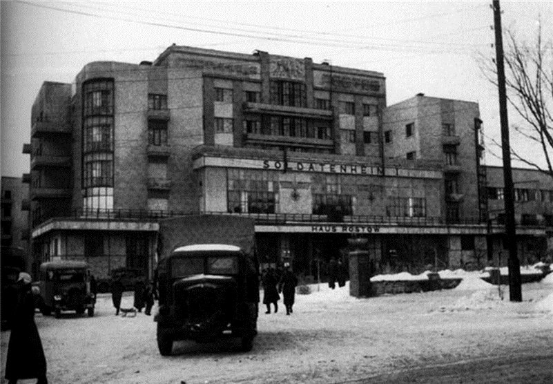 Ростов-на-Дону в период нацистской оккупации